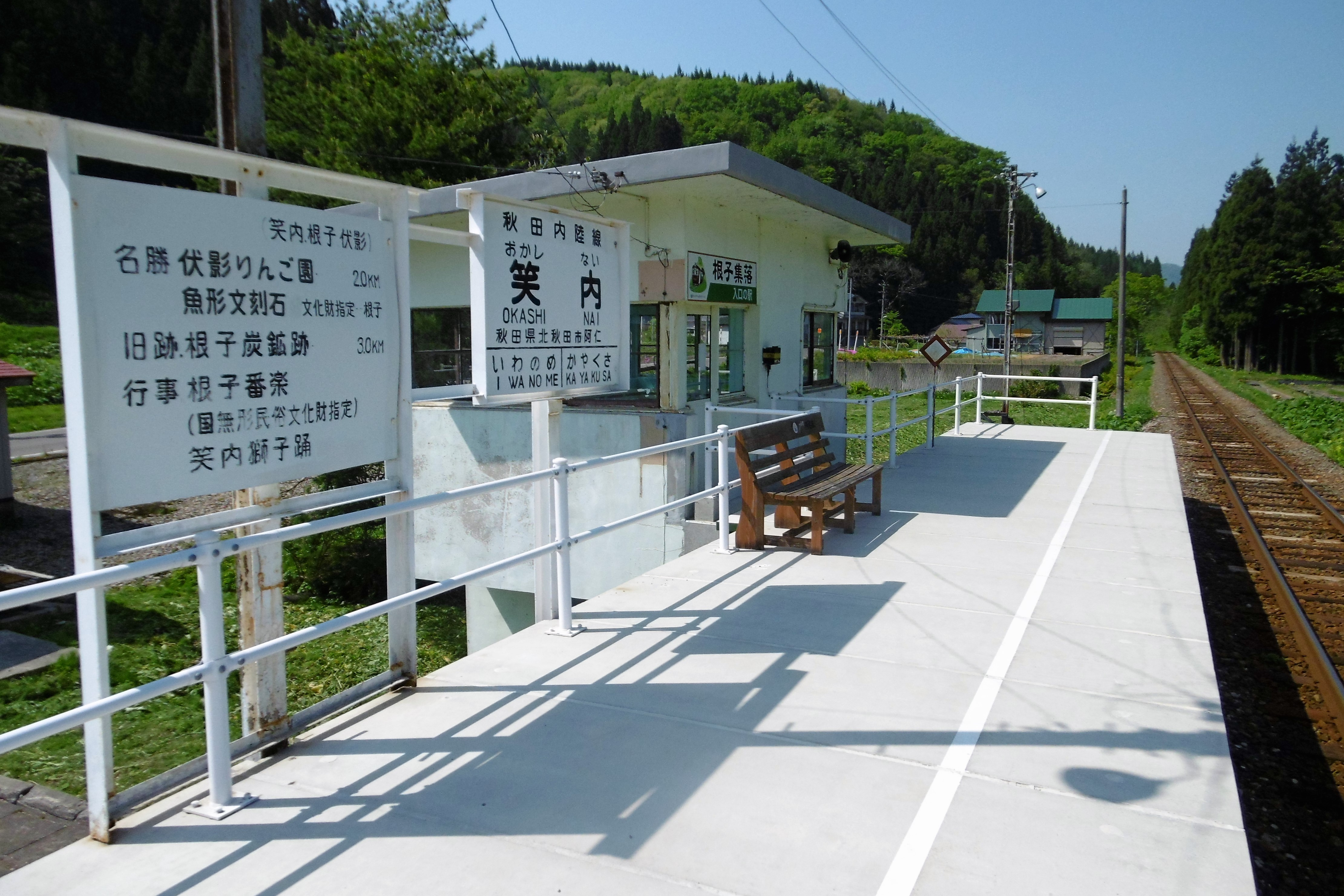 秋田内陸線 笑内（おかしない）駅：秋田県北秋田市阿仁笑内